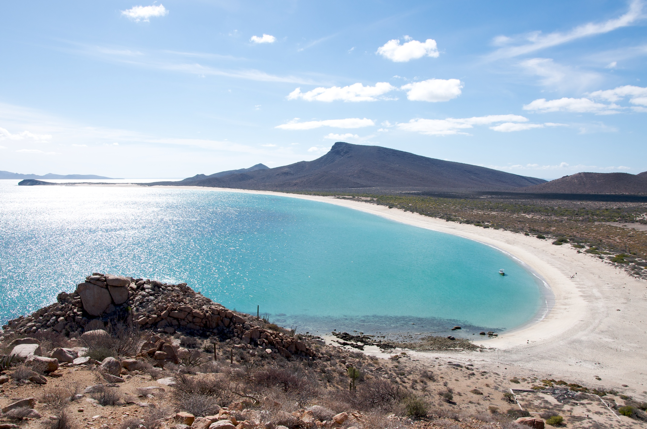 La playa de Isla Espíritu Santo